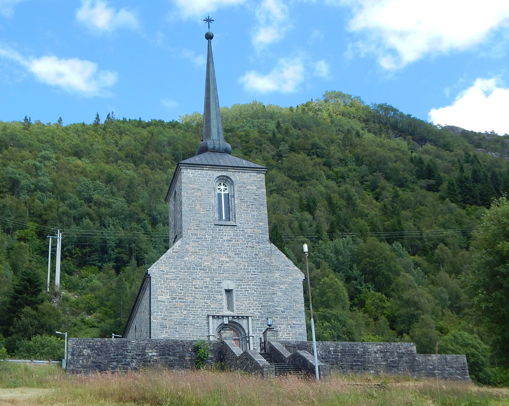 Vaksdal kirke